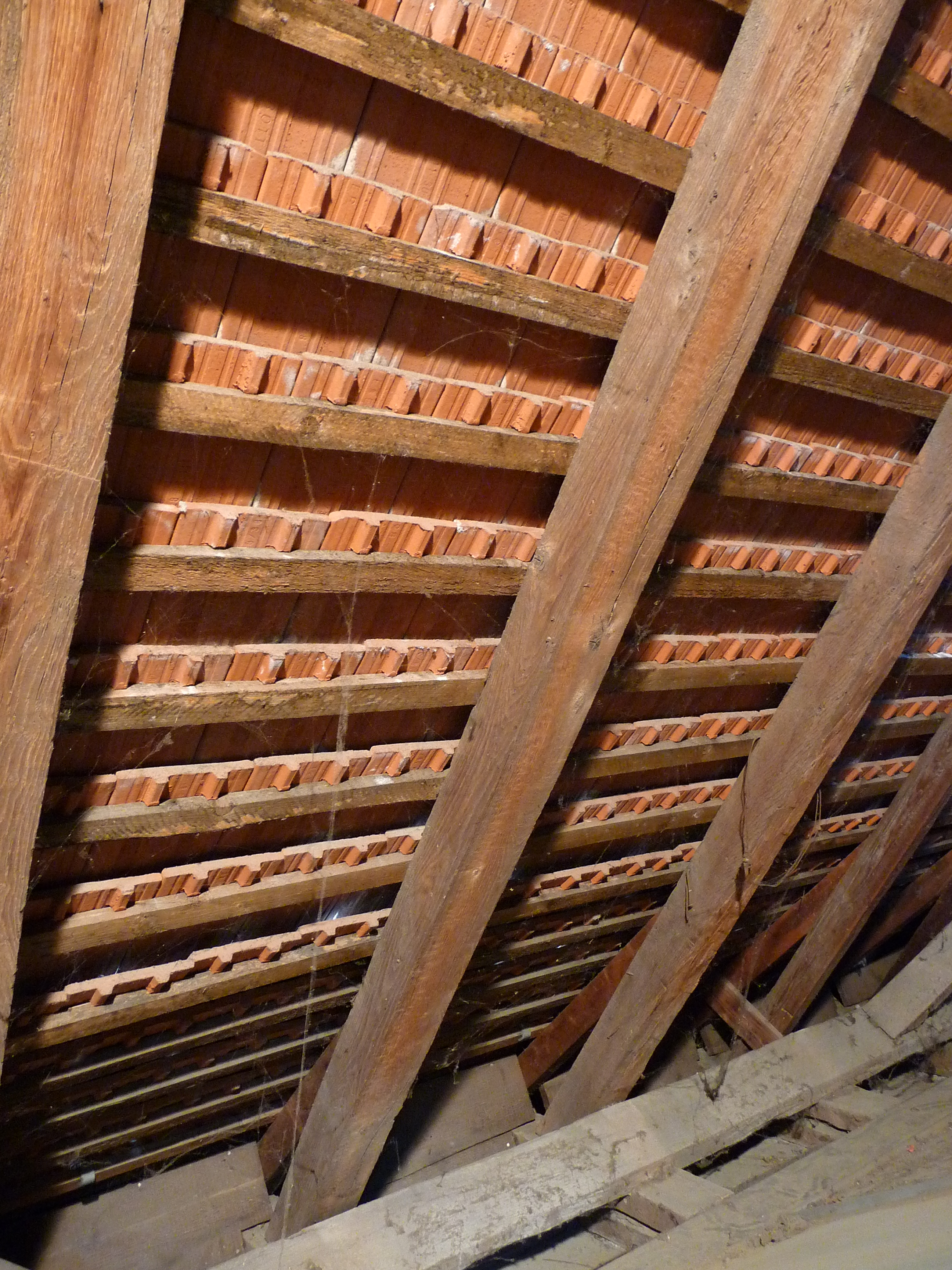 Mit Ziegeln gedecktes Dach einer alten Scheune, fotografiert in Heidelberg (Baden-Württemberg, Deutschland)